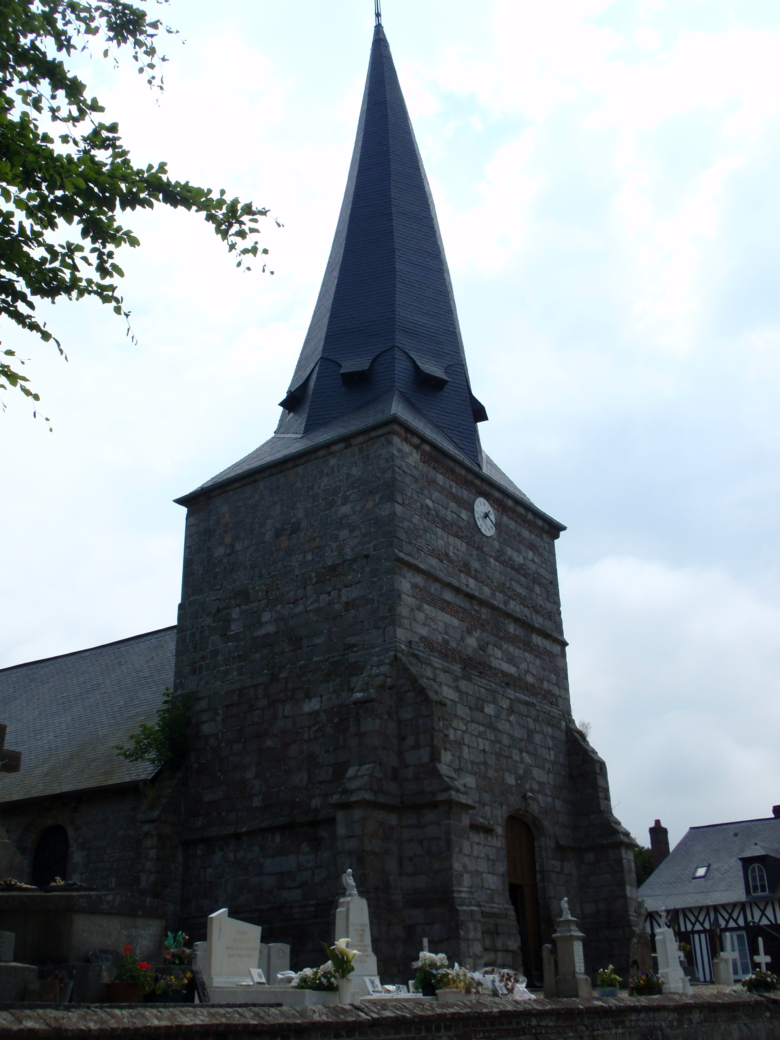 XII-XVII siecle , eglise St Pierre